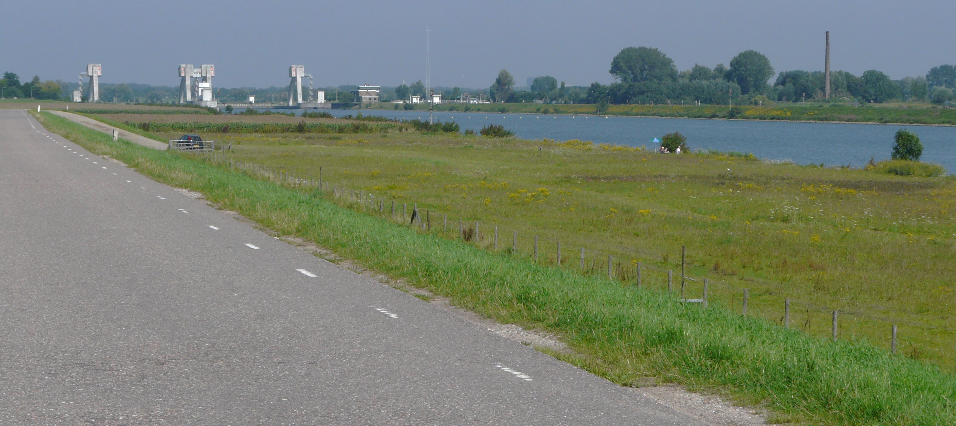 Stuw van Hagestein